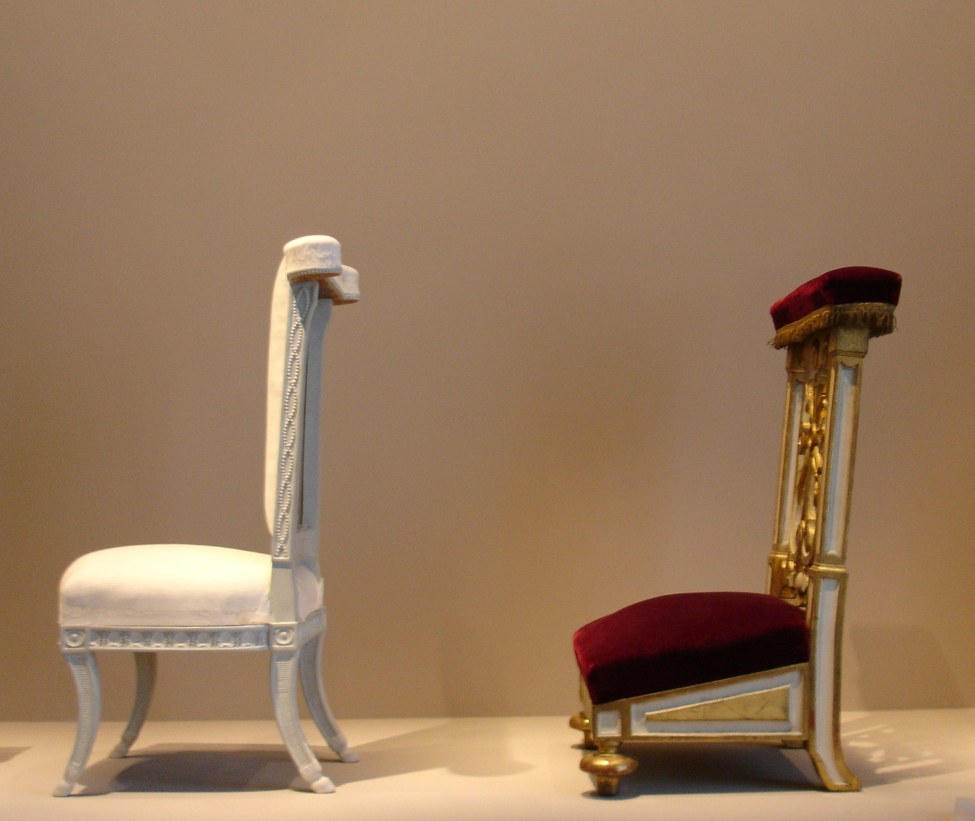 Own photograph; from [Musée des Arts Décoratifs]